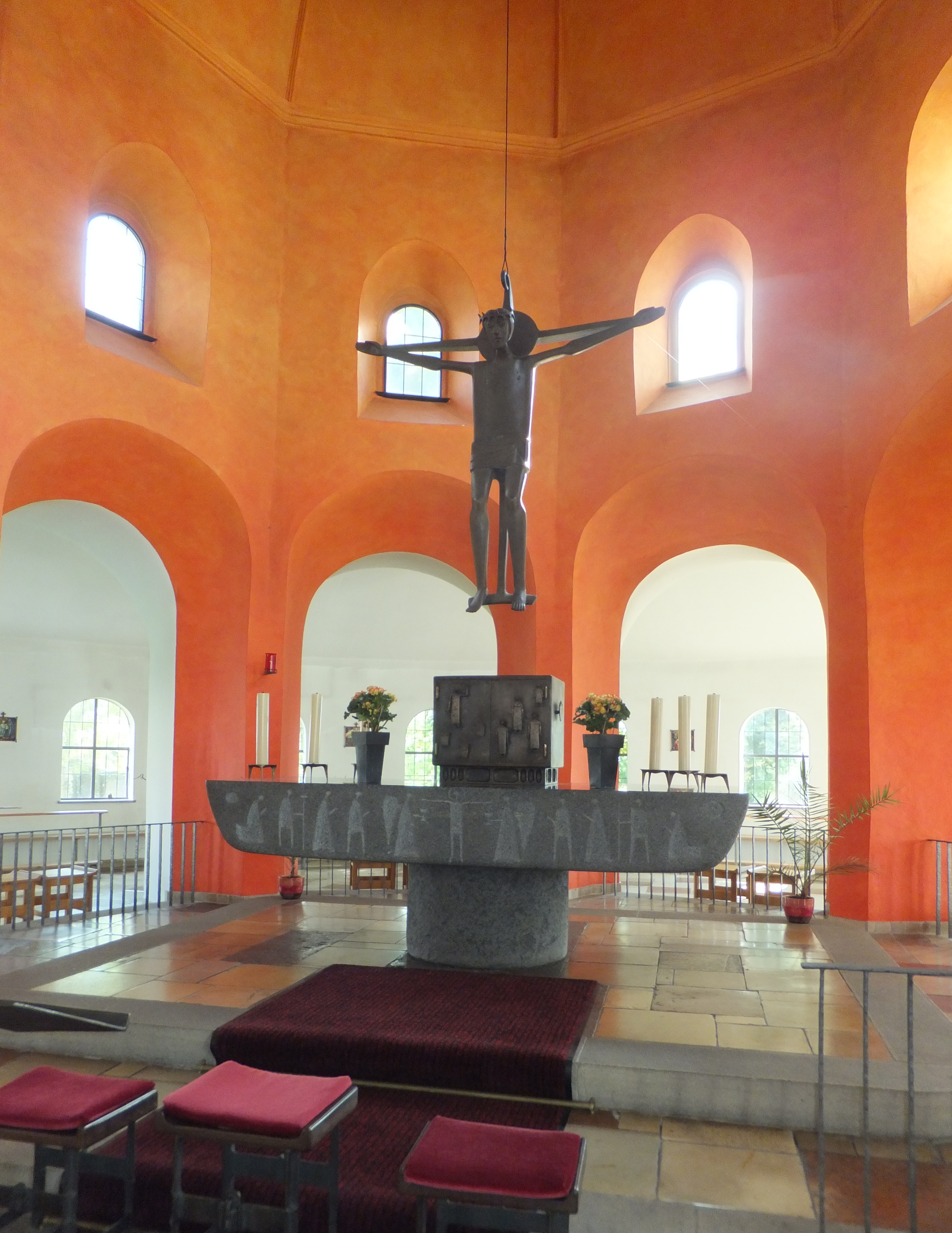 Burgenstr 11 - Kirche